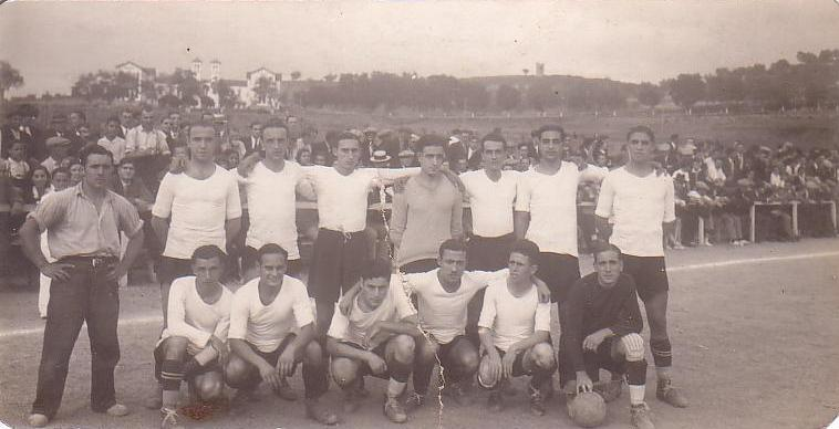 Foto EC granollers. Temporada 1930-1931